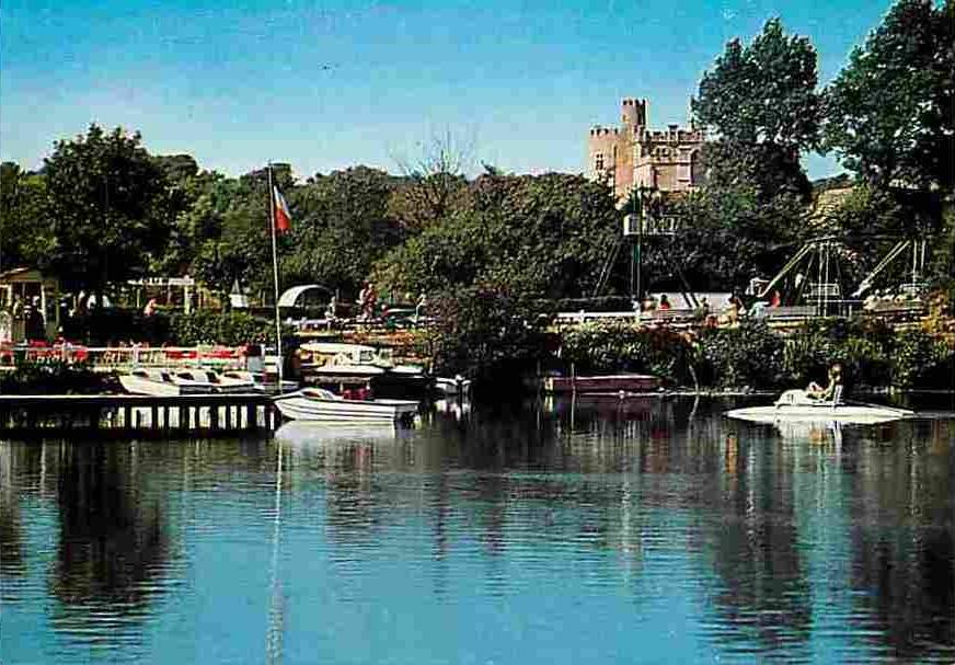 Le lac des miroirs de Condette avant les travaux des années 2000